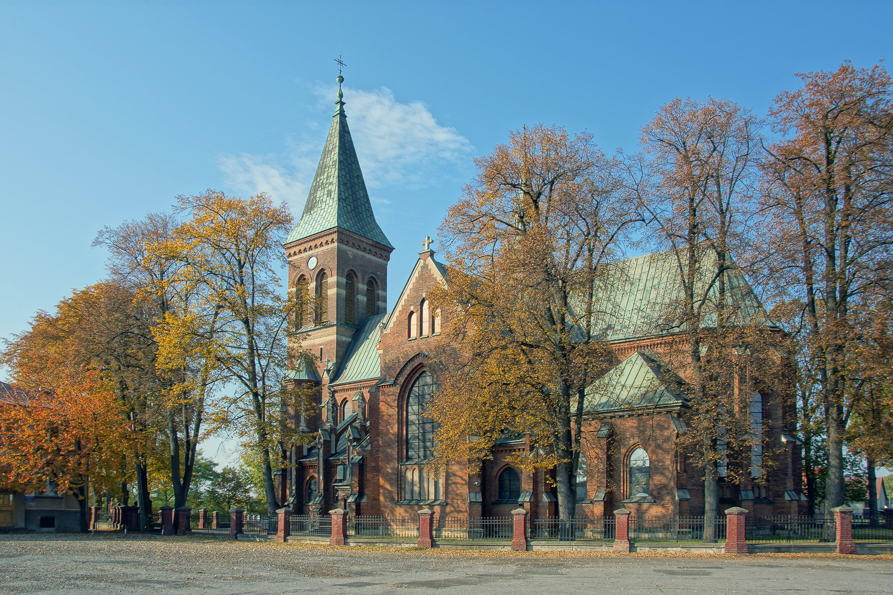 Jadowniki, kościół parafialny pw. św. Prokopa Opata, 1910